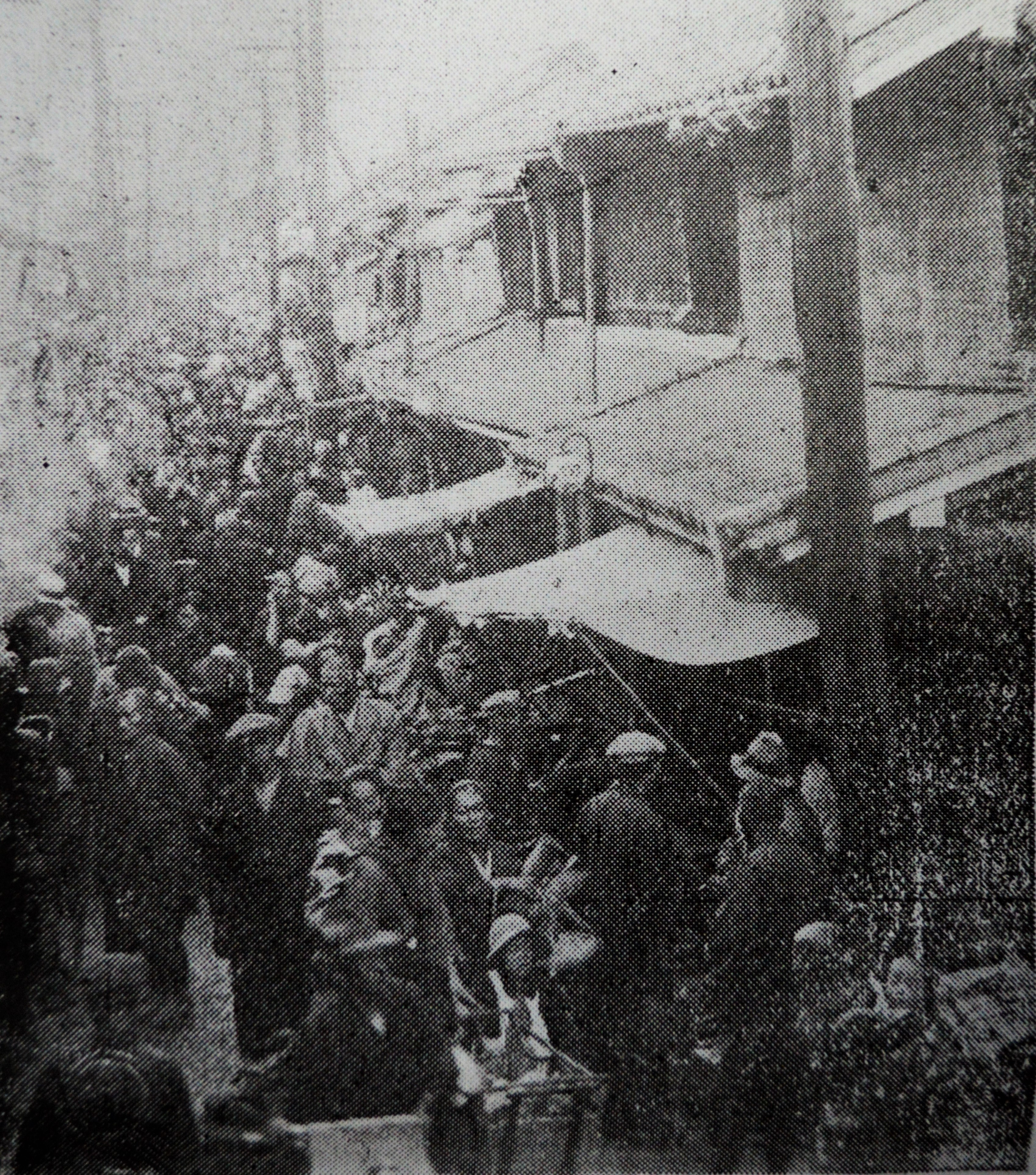 愛知県丹羽郡古知野町（現・江南市）にあった古知野市場。